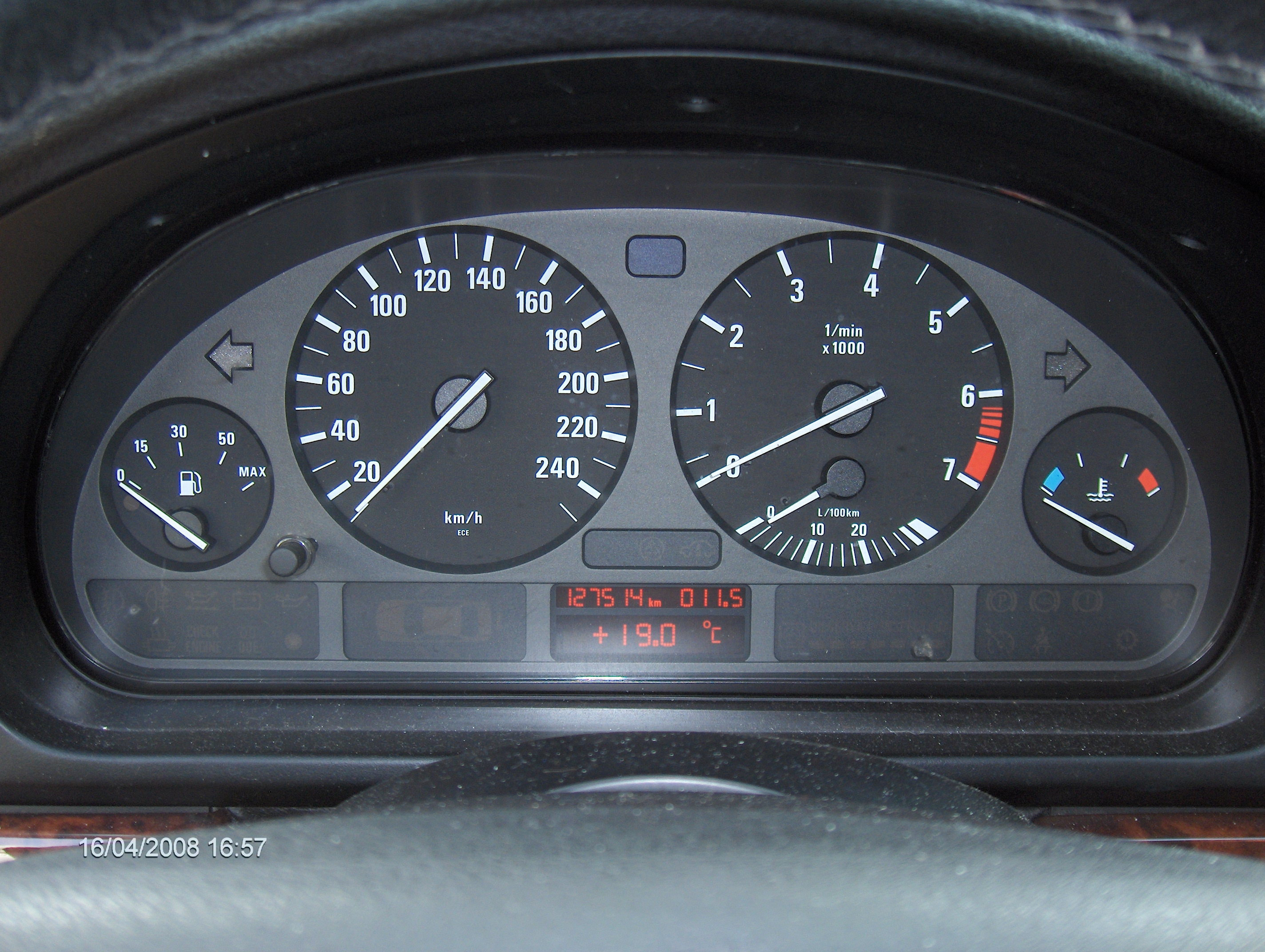 Cuadro de un BMW E39 con tacómetro y velocímetro analógicos